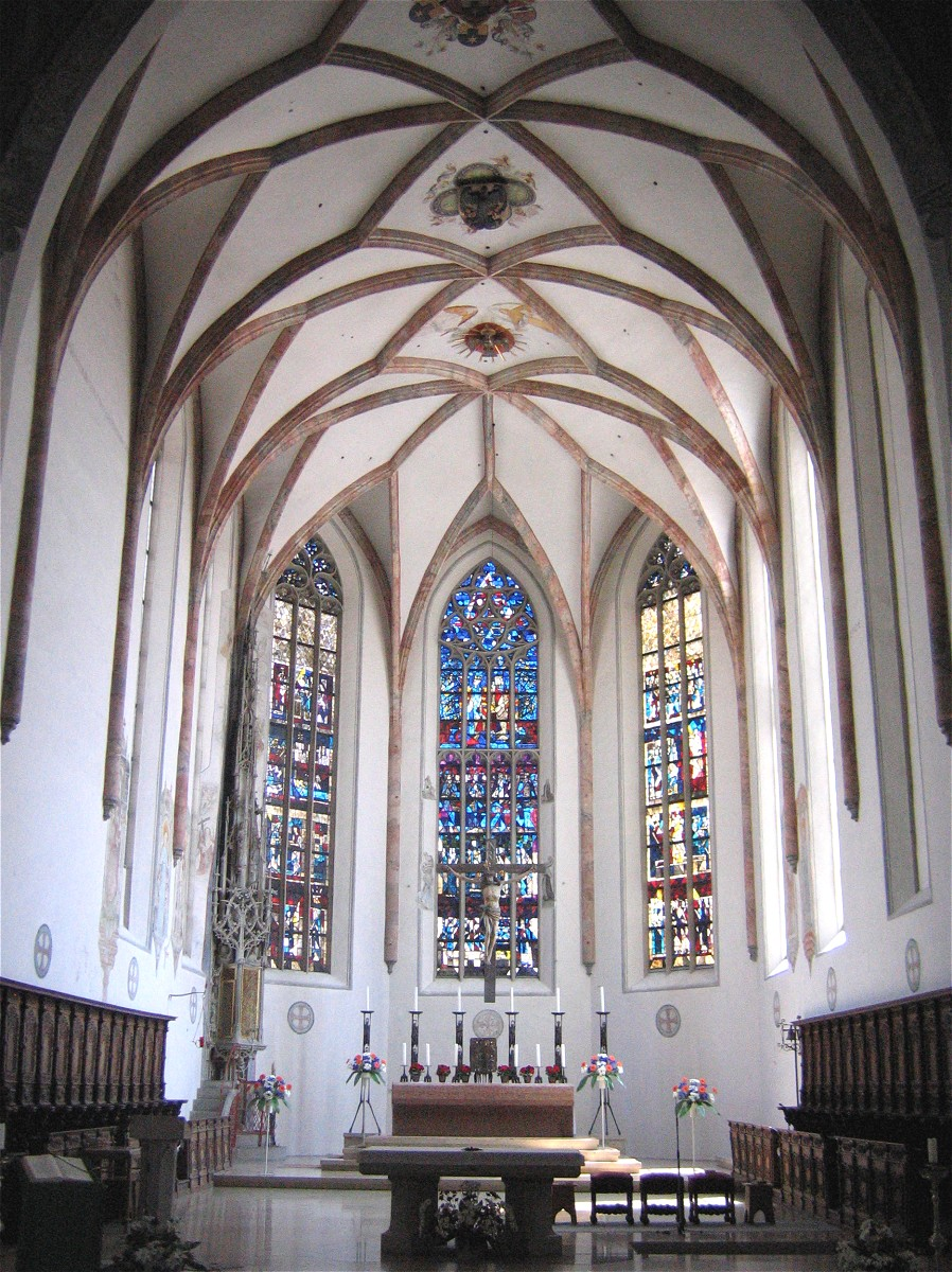 Donauwoerth, Liebfrauenmünster, Chorraum